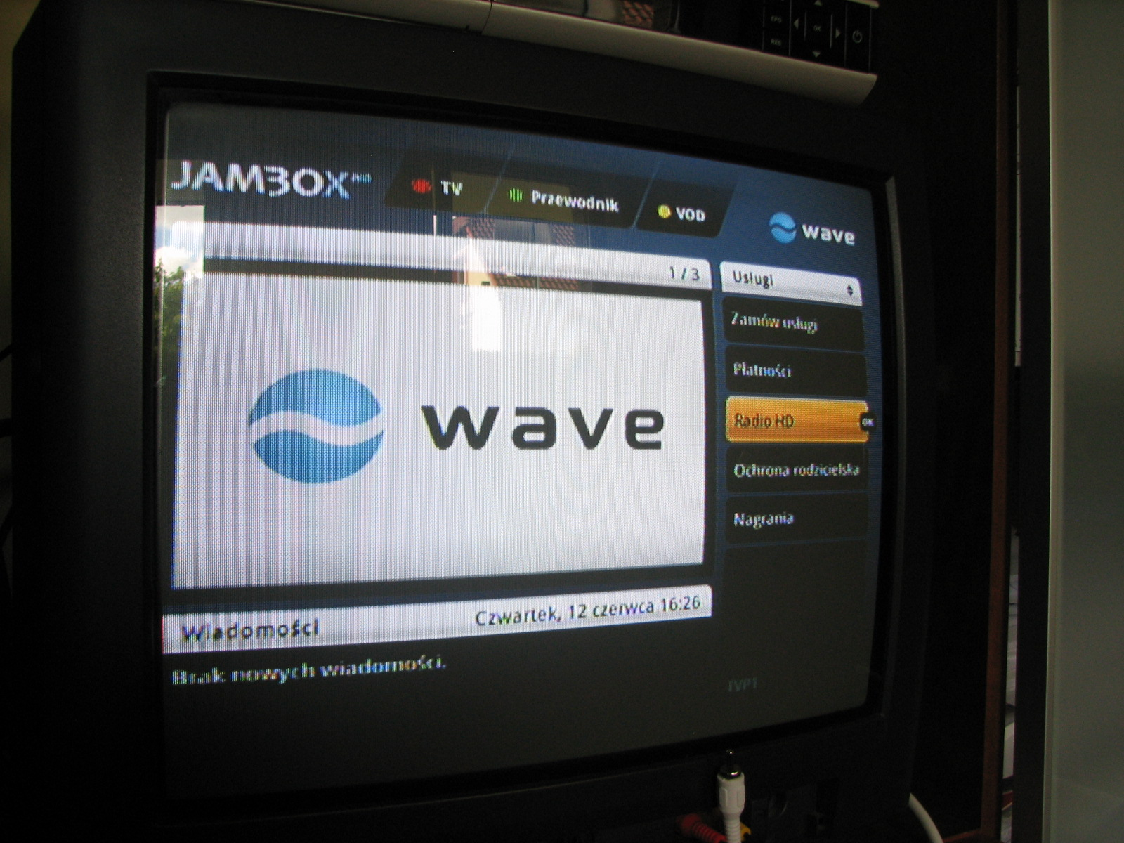 Zdjęcie telewizora z podłączonym dekoderem telewizji JAMBOX. Na ekranie jest widoczny TV Portal z logo Wave.